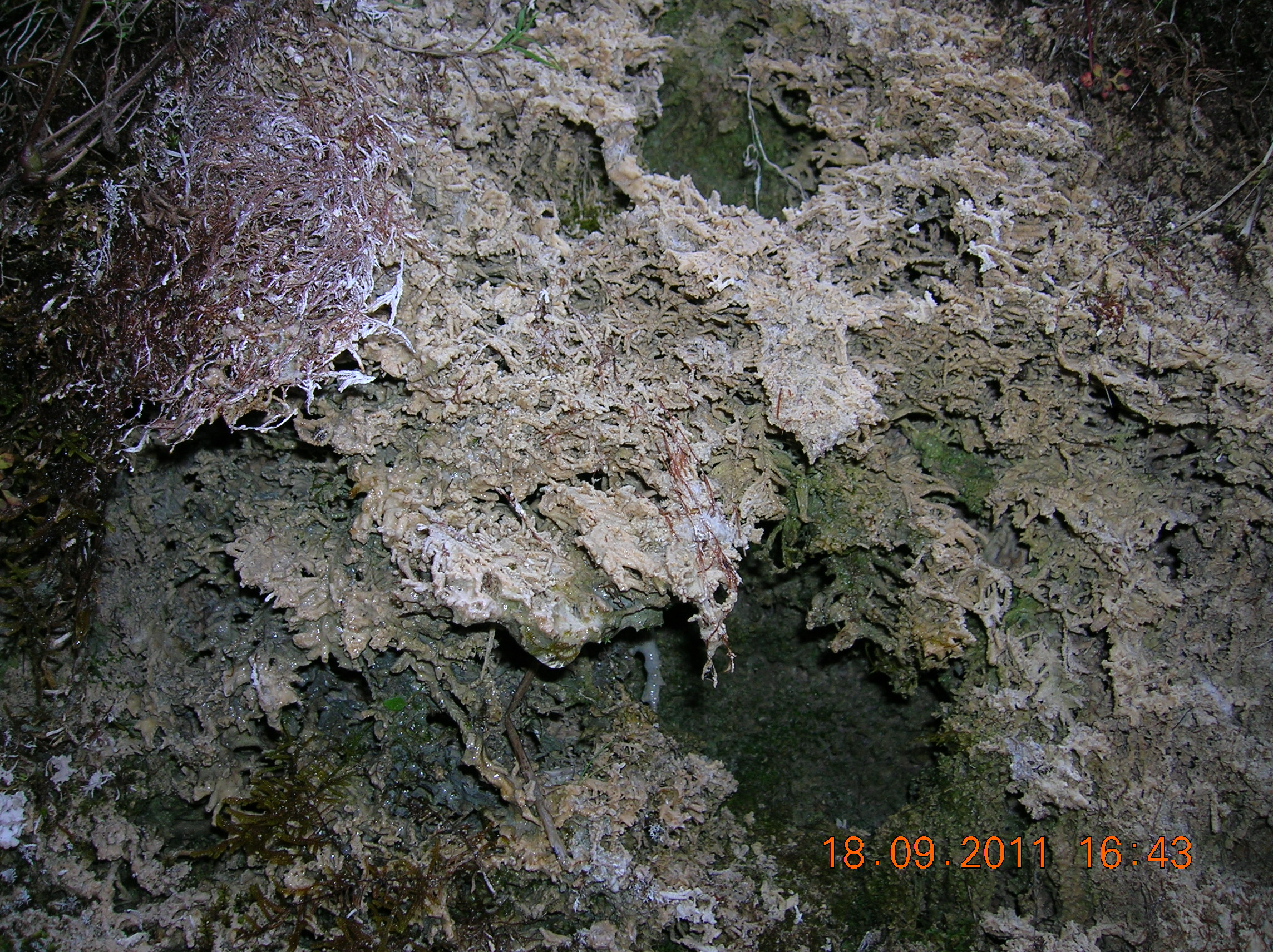 Cheile Şugăului, Rezervaţia Cheile Şugăului-Munticelu, Parcul Naţional Cheile Bicazului-Hăşmaş, Judeţul Neamţ, România